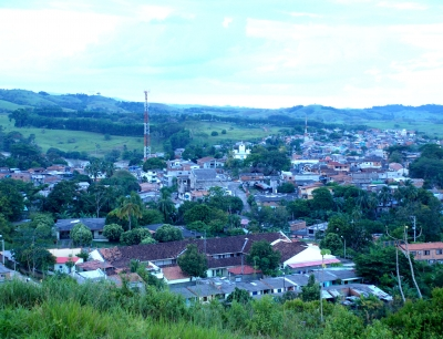 Taraza-Antioquia